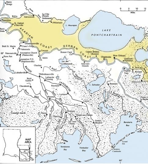 Map of the Bayou Lafourche region in Louisiana